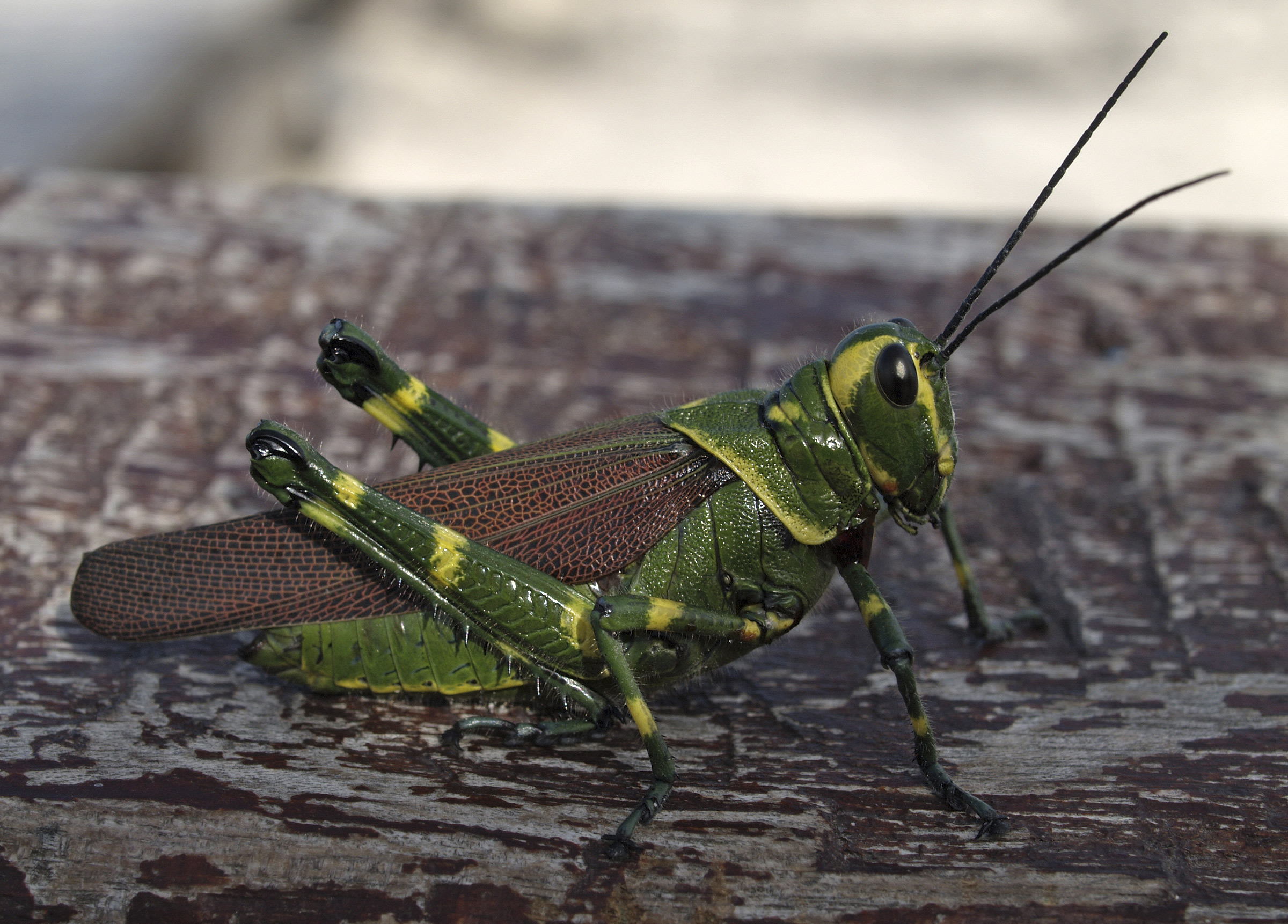 Chromacris sp. (Orthoptera, Romaleidae). Puerto Morelos, Quintana Roo, México.